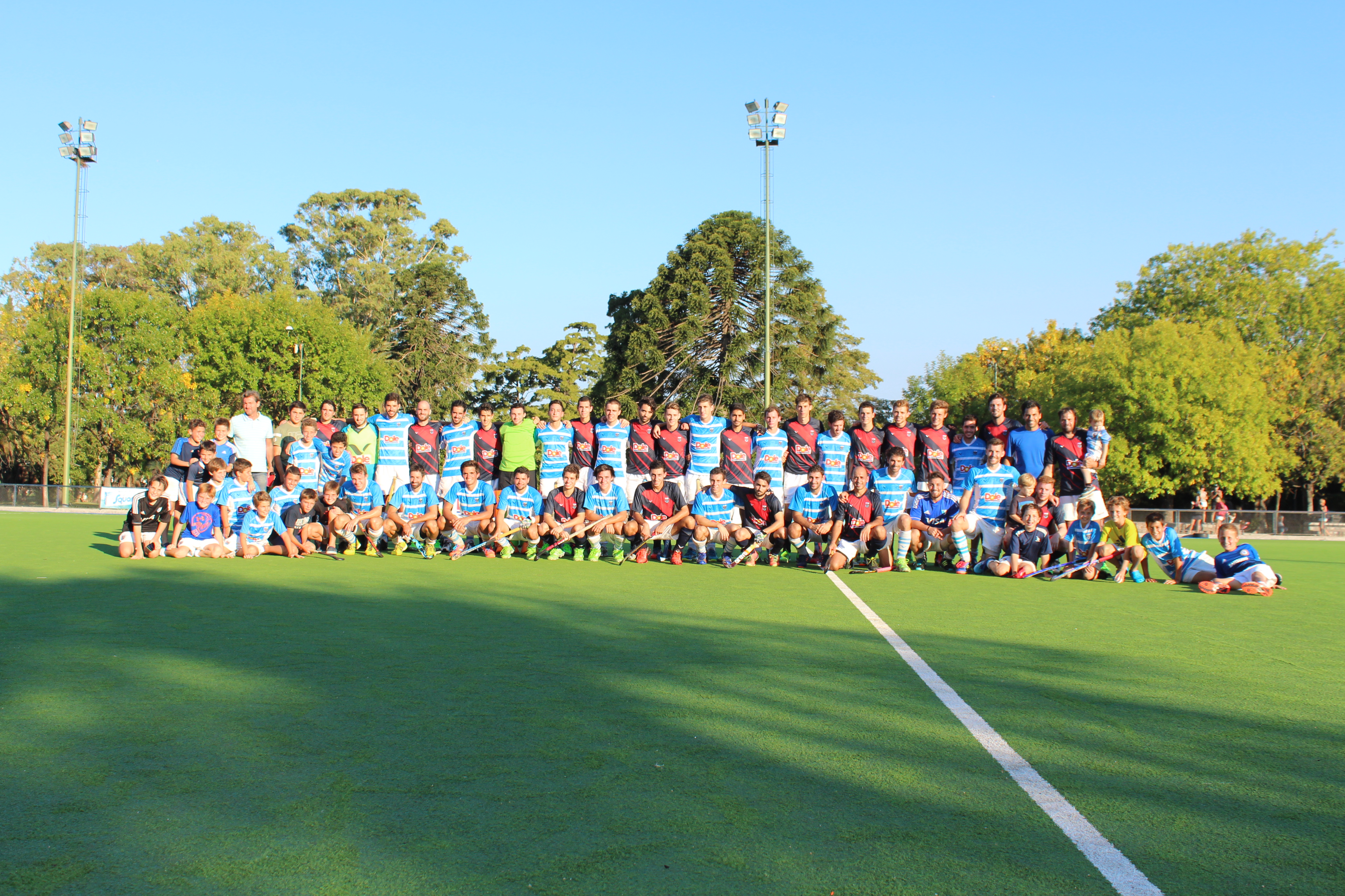 Muni B 2017